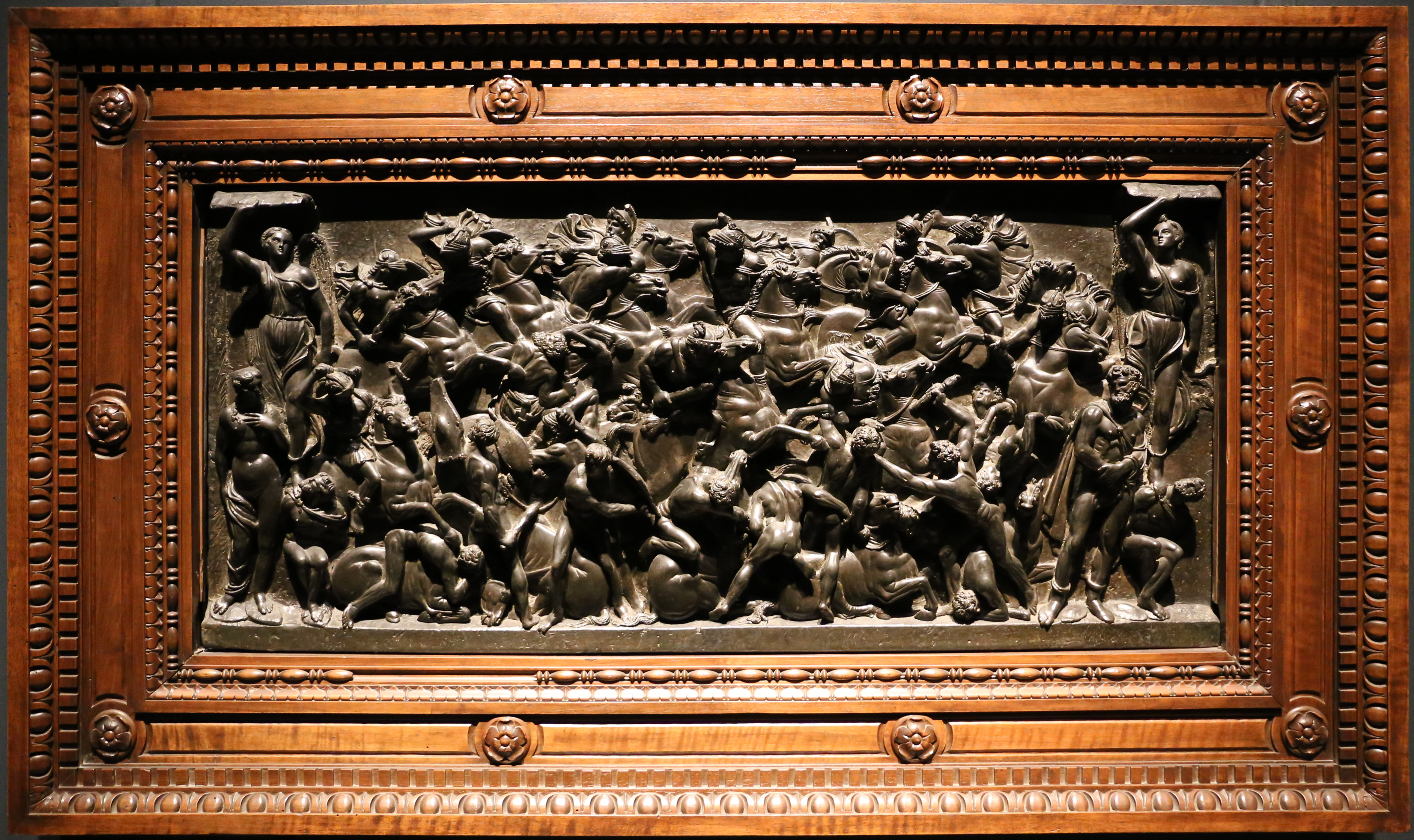 Palazzo dei Diamanti (Ferrara) This is a photo of a monument which is part of cultural heritage of Italy.